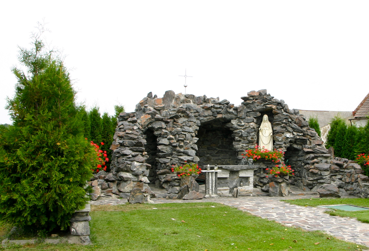 Nowa Wieś Prudnicka (dodatkowa nazwa w j. niem. Neudorf – wieś w Polsce położona w województwie opolskim, w powiecie prudnickim, w gminie Biała.